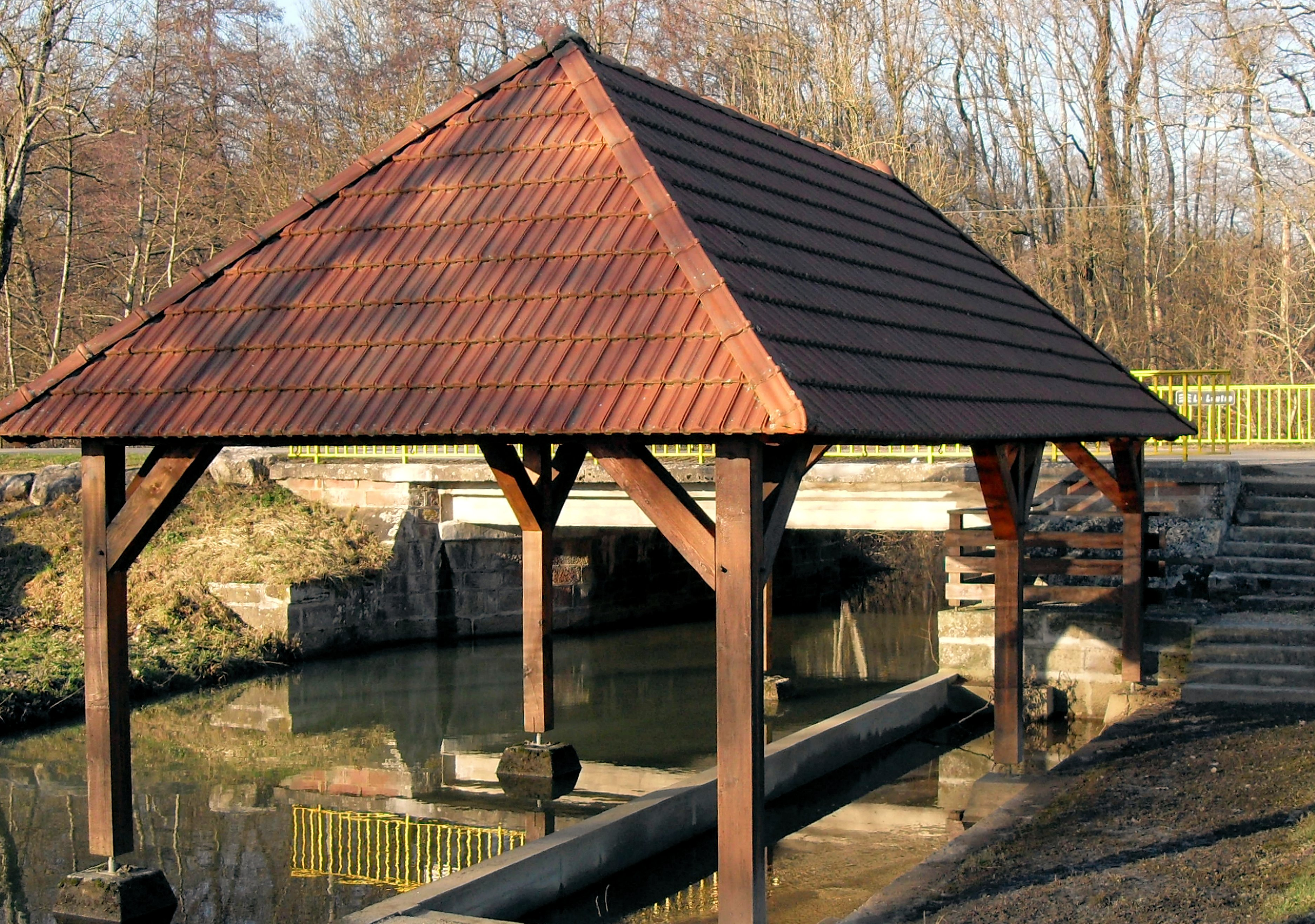 l'ancien lavoir restauré à Chavannes-sur-l'Étang